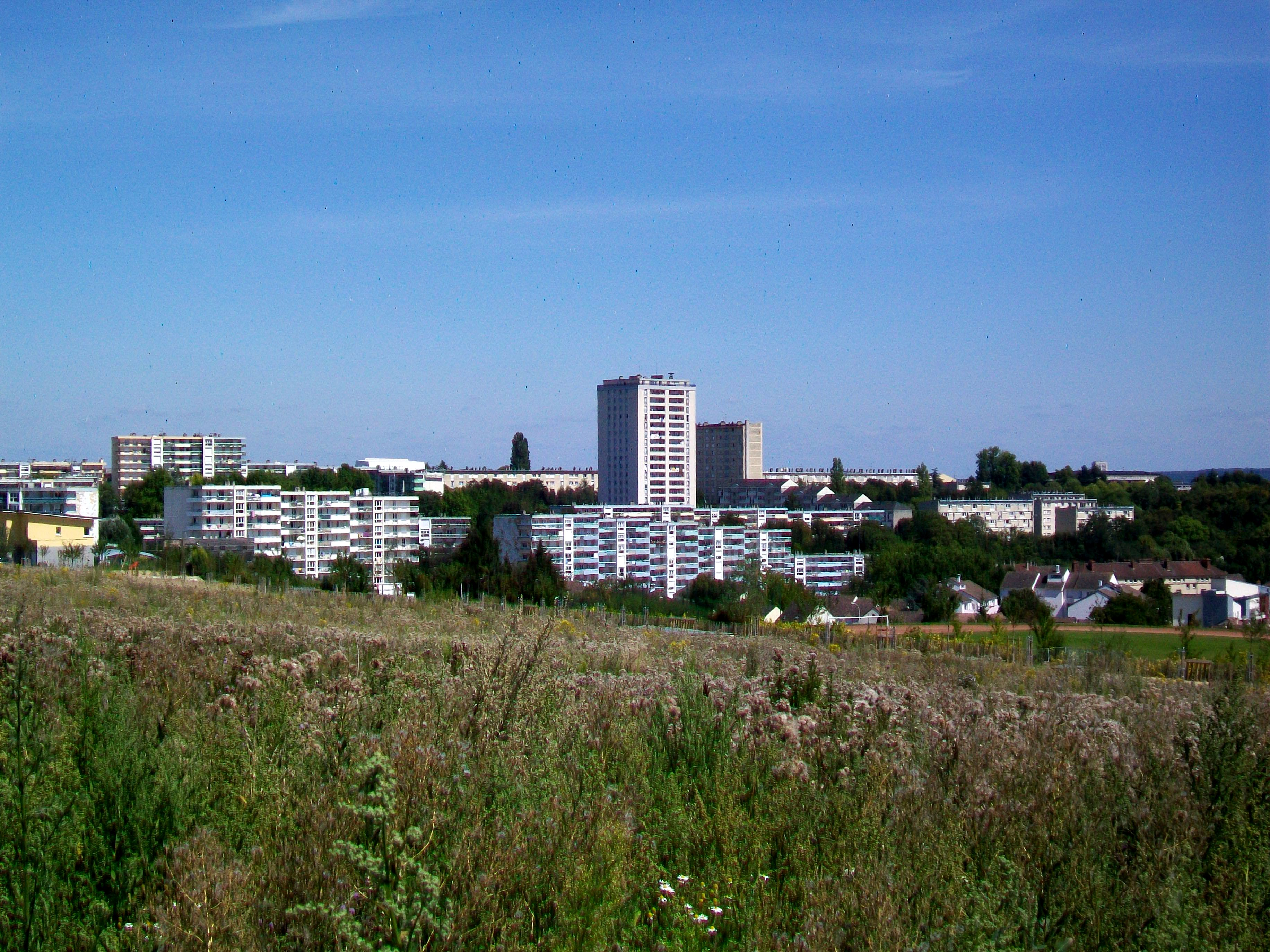 Vue sur le quartier nord et le chantier de l'avenue du 17 octobre 1961.